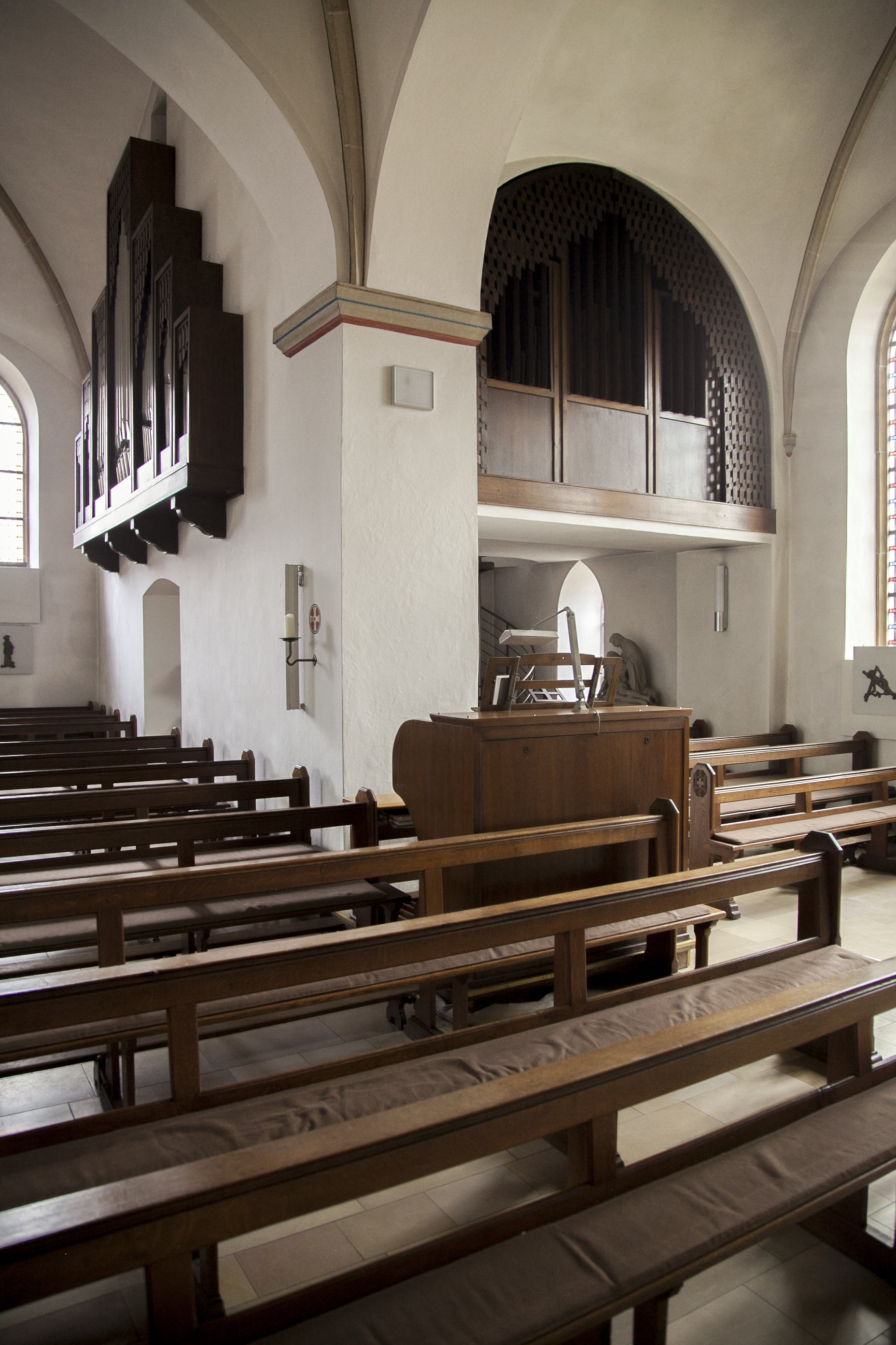 Elte, St. Ludgerus, Orgel